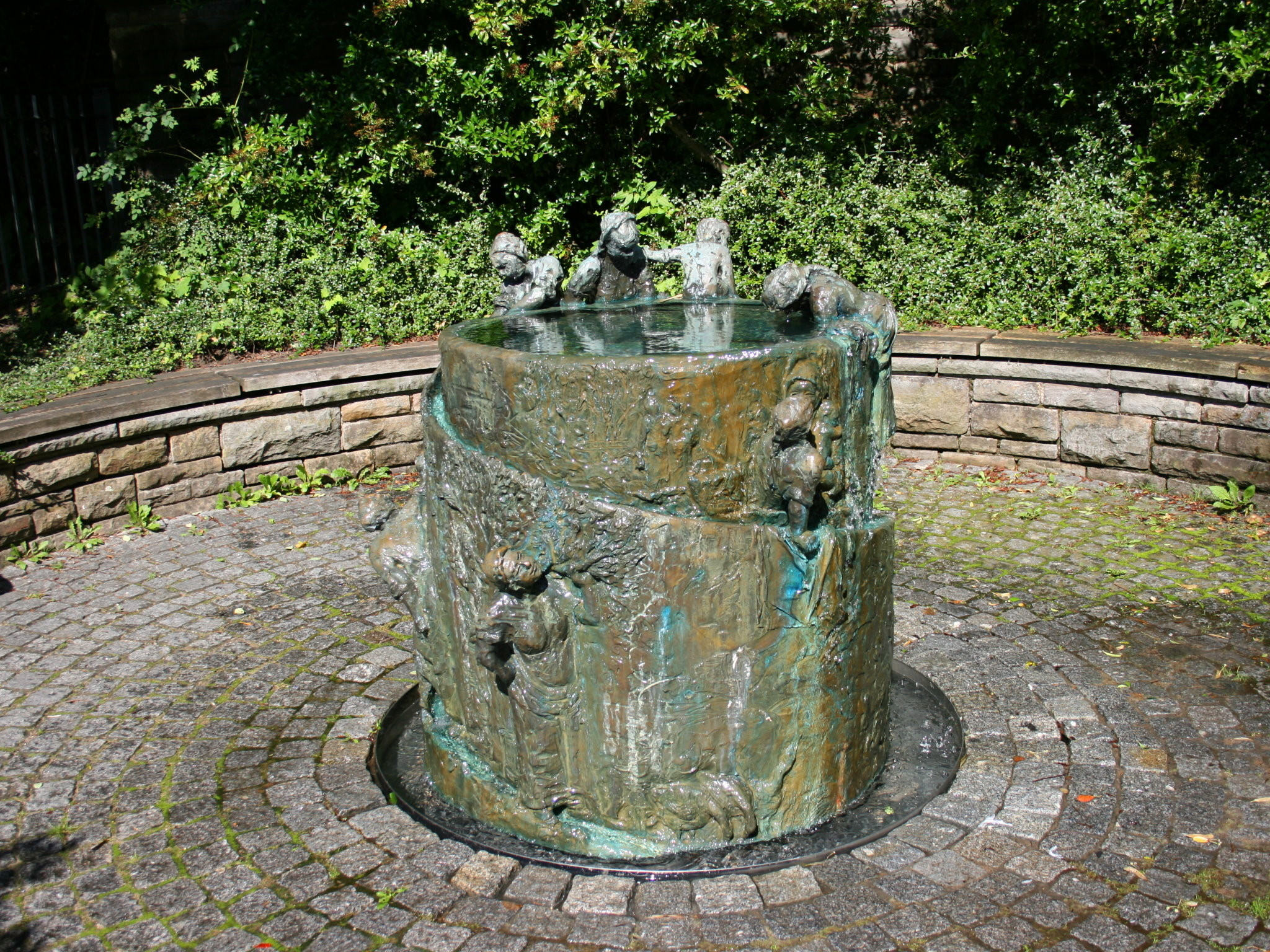 Langerfelder Markt in Wuppertal-Langerfeld